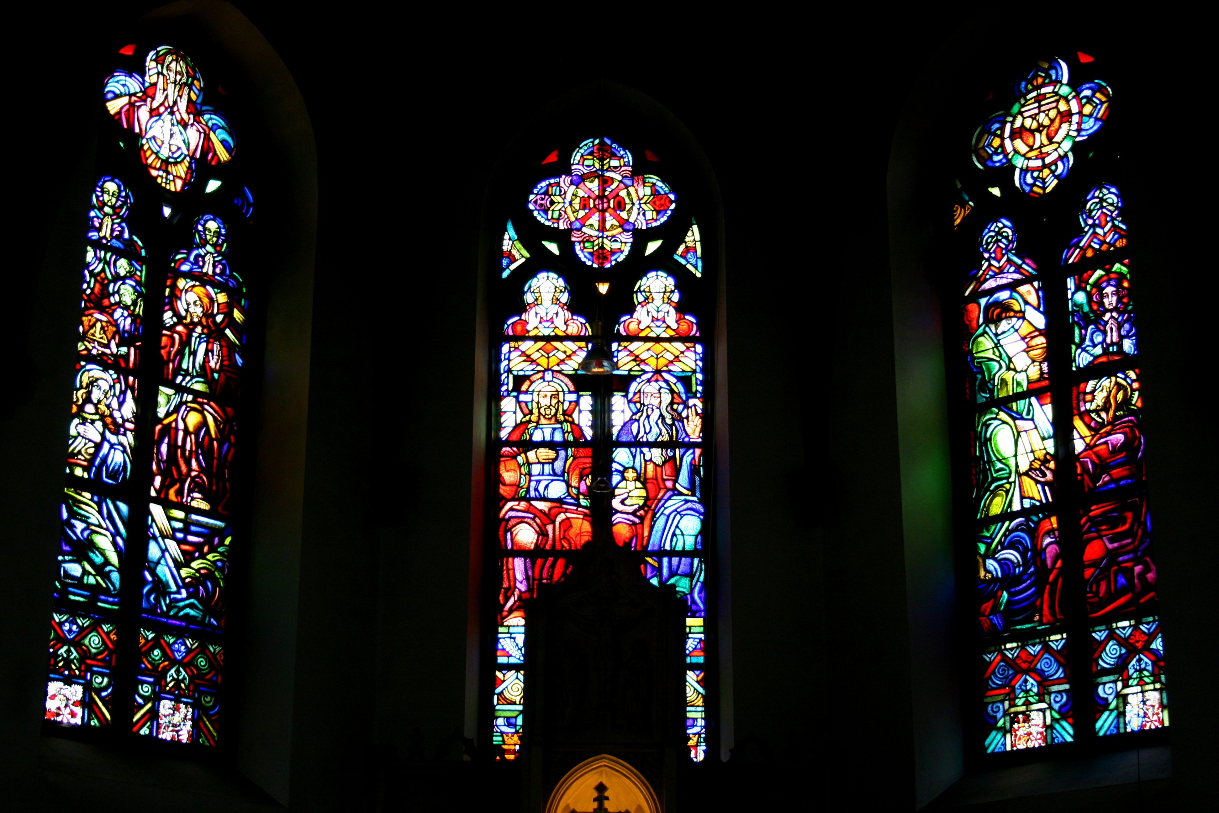 Sankt Johann Baptist in Marienheide-Gimborn